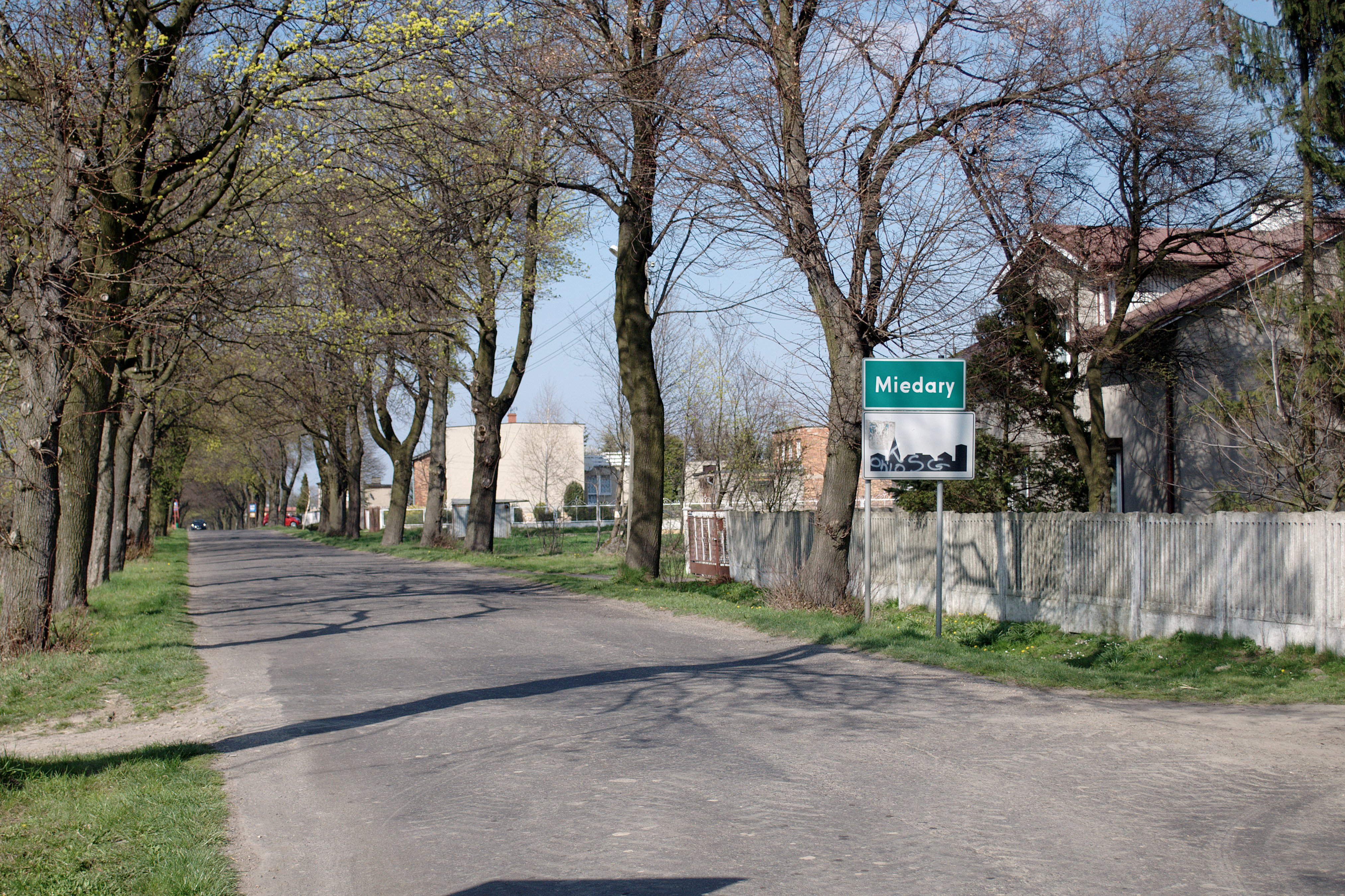 Miedary.